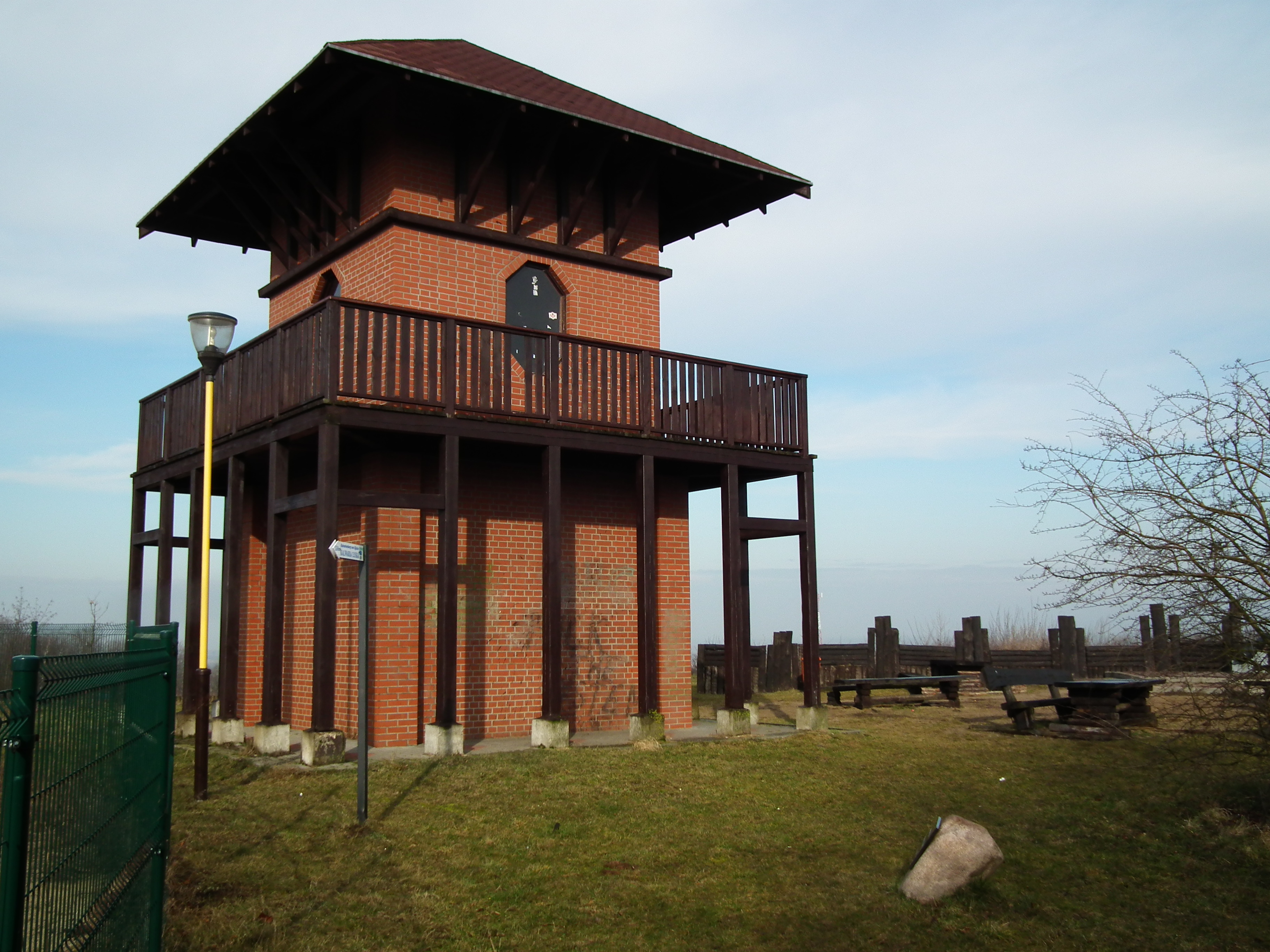 Okolice wieży widokowej w Ujściu (dol. Noteci).